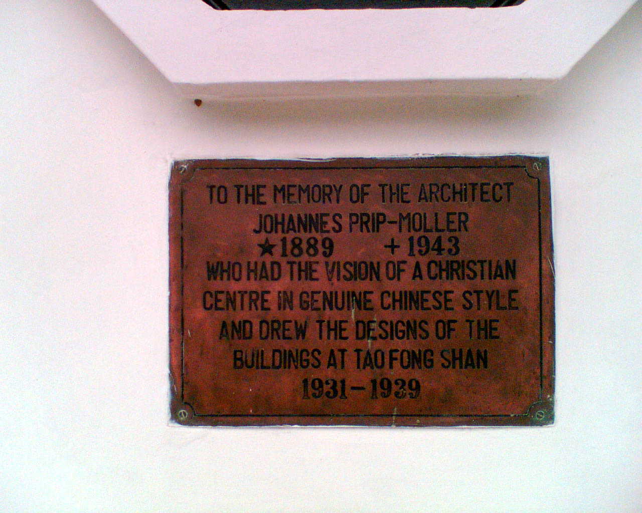 道風山紀念艾術華的銅牌